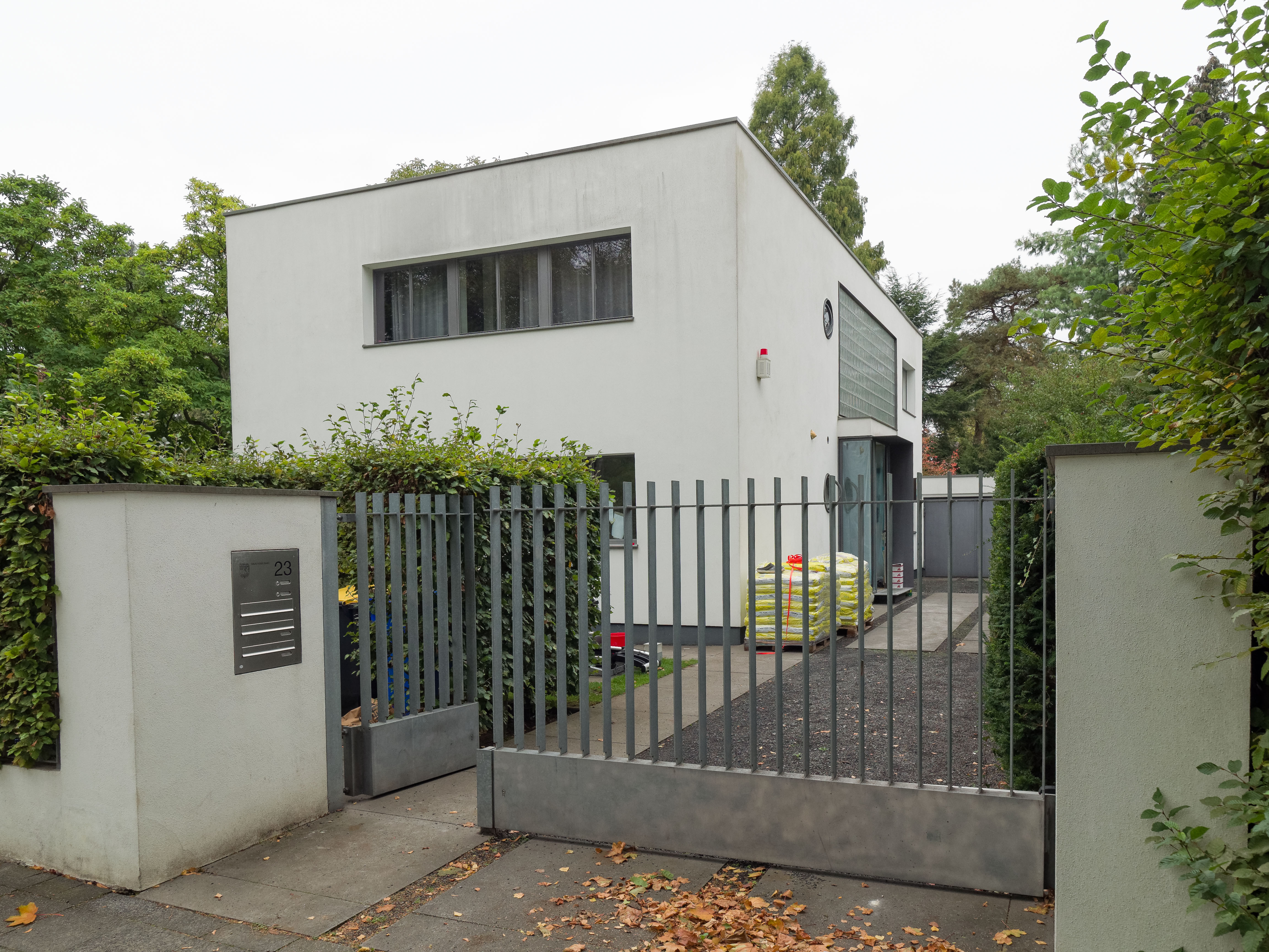 Krefeld Denkmal 625: Haus Vogelsang